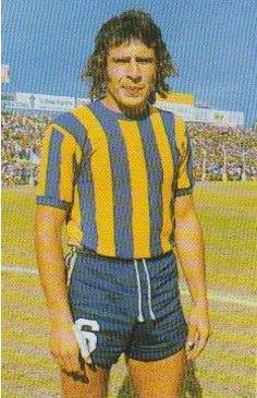 Daniel Pedro Killer, el Caballo.